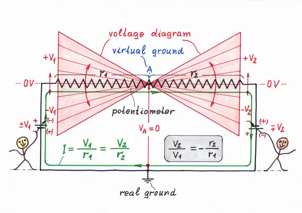 Voltage diagram of a potentiometer